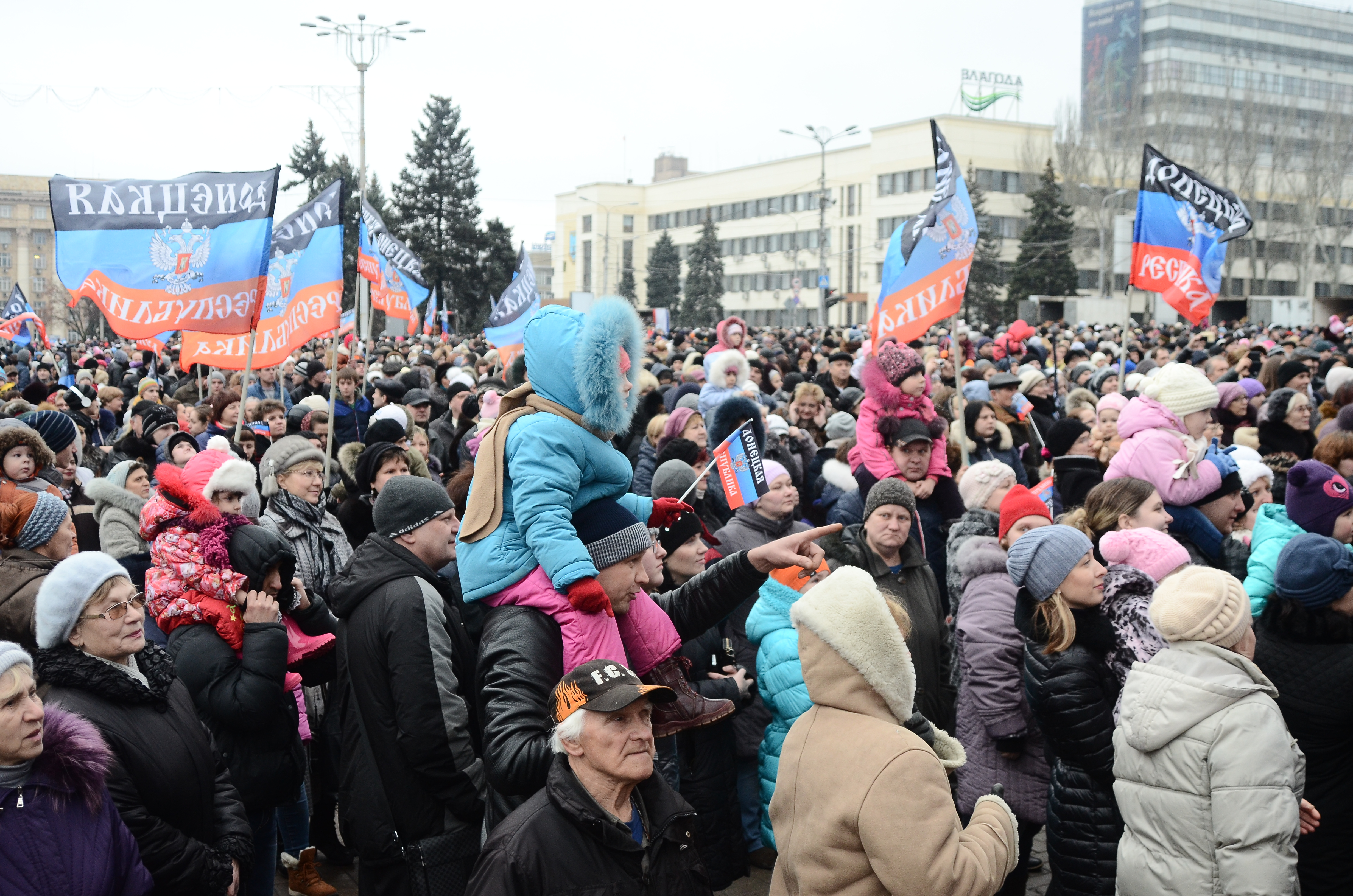 Праздник солидарности